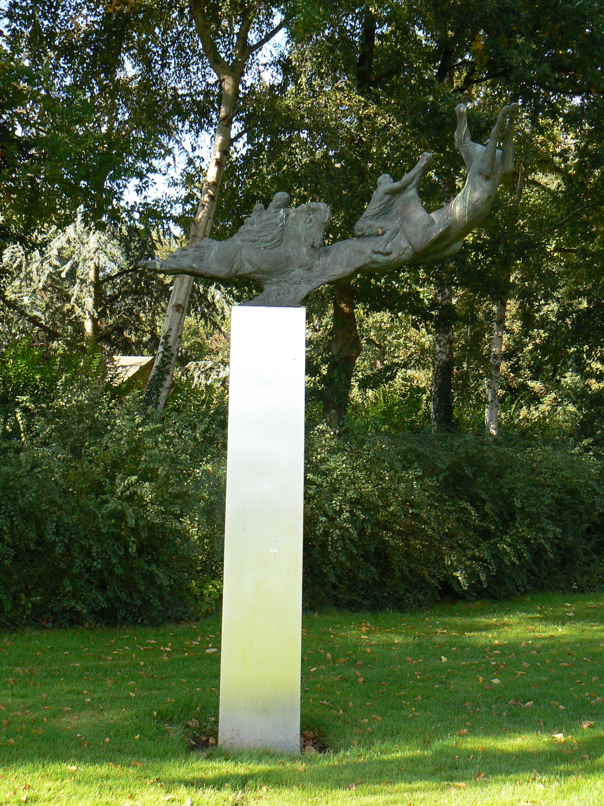 sculpture Luchtspektakel (1989) in Nieuwe Pekela/The Netherlands